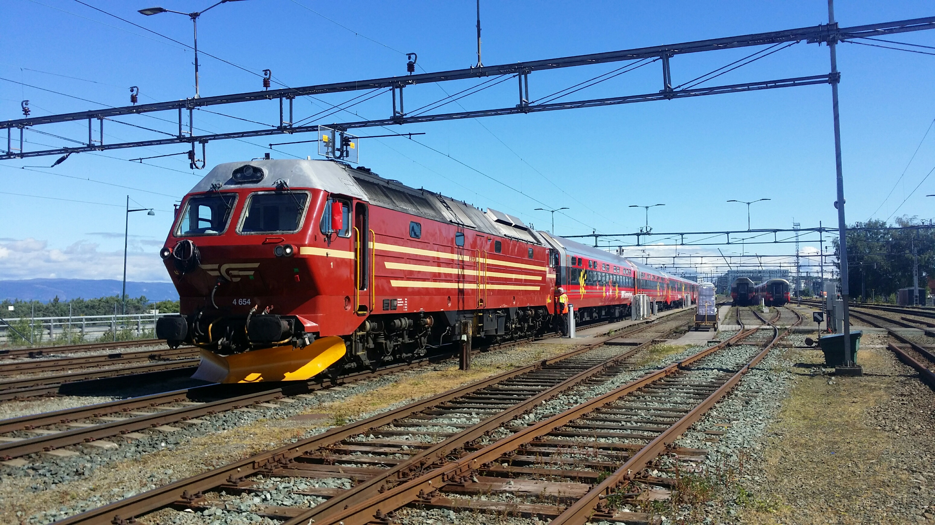 Di 4.654 med Sommertoget i Trondheim 22. juni 2017.